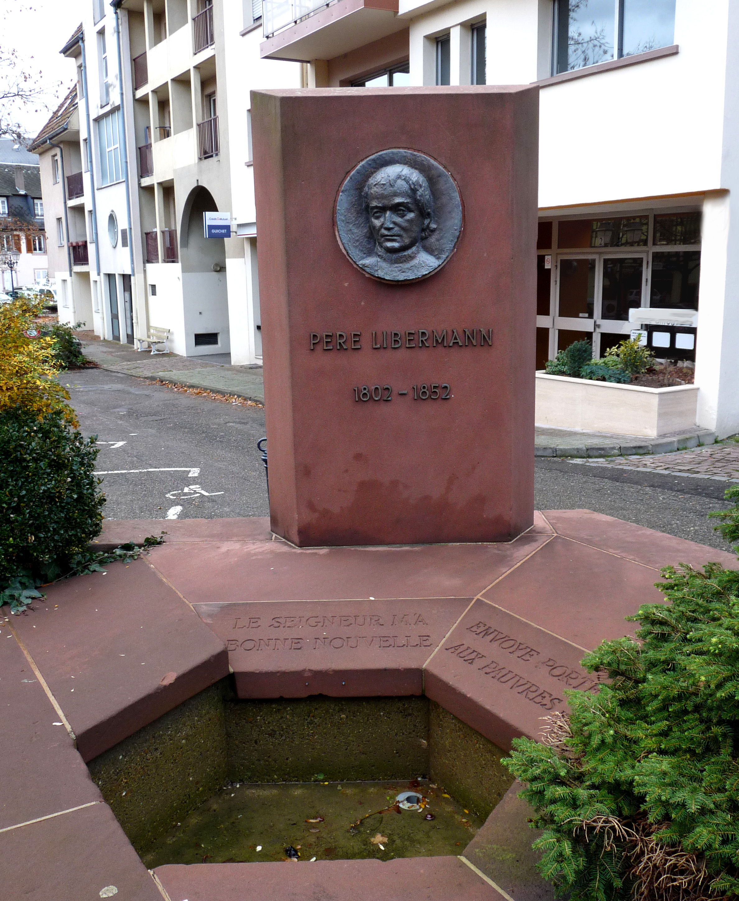 Monument dédié au François Libermann à Saverne (Bas-Rhin), sa ville natale.